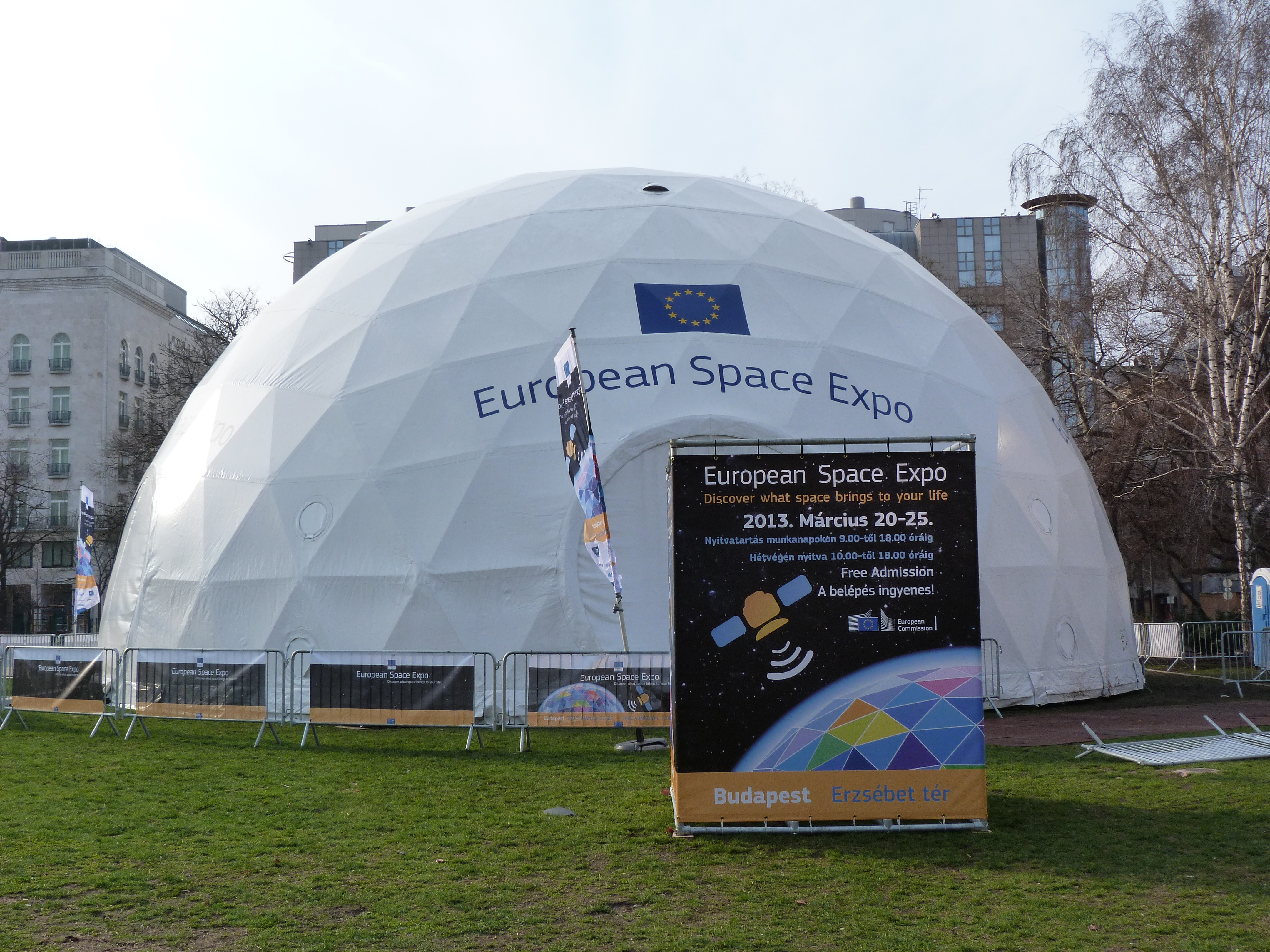 Live on the 22th of March, 2013. European Space Expo. Erzsébet tér, Downtown Budapest. Travelling exhibiton 20 - 25 March 2013. Europe is strengthening its capacity for sea monitoring, border surveillance, space exploration and providing all EU countries with access to space. Along with Galileo (global satellite navigation system) and Copernicus (global monitoring for environment and security system). Sources